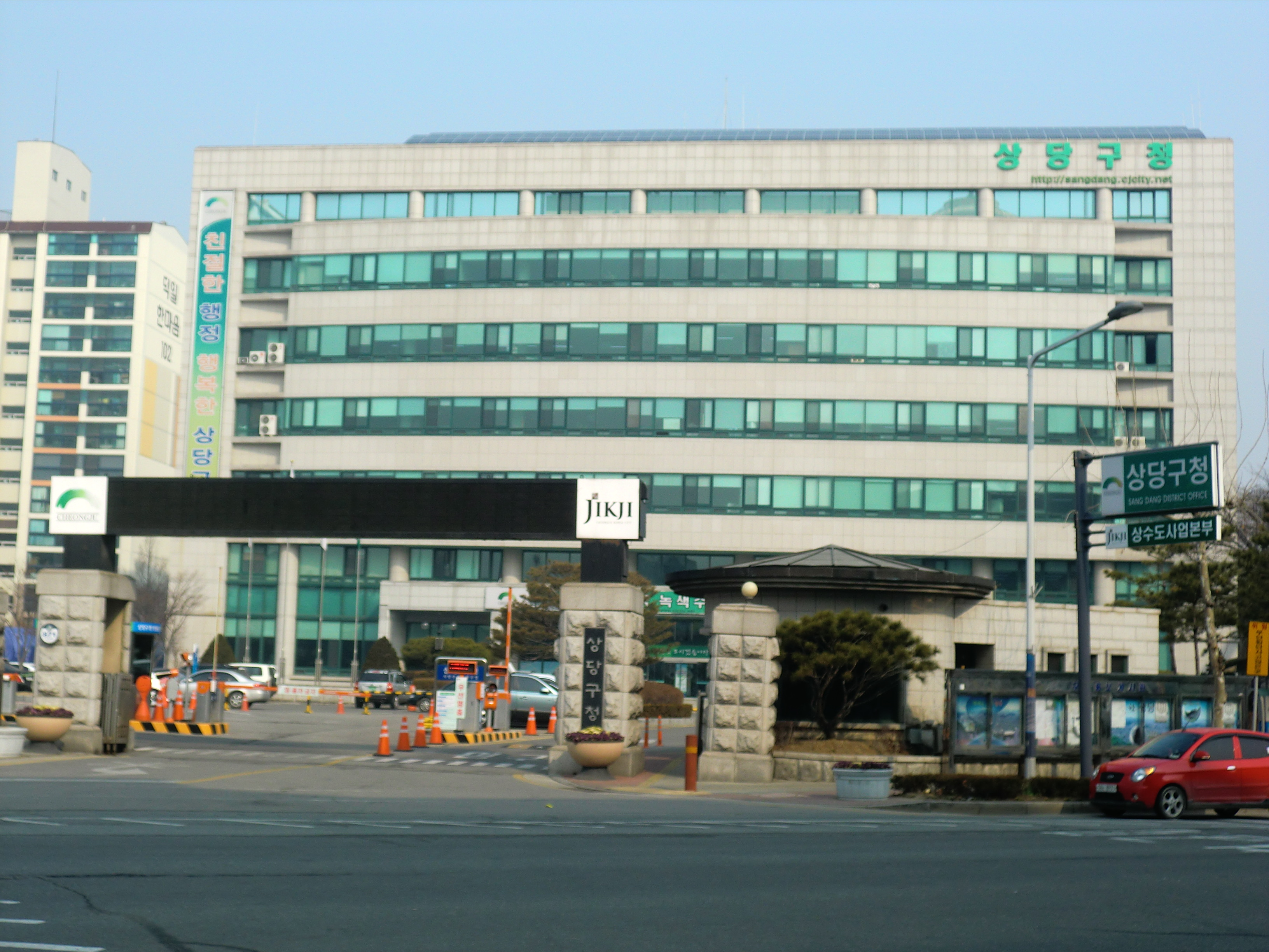 충청북도 청주시에 있는 상당구청